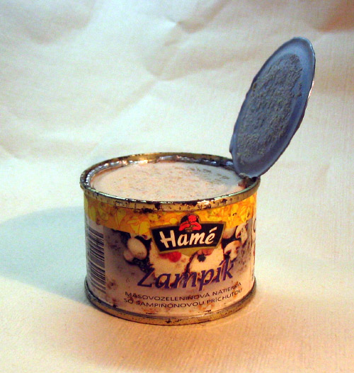 Archivní konzerva pomazánky Žampík.